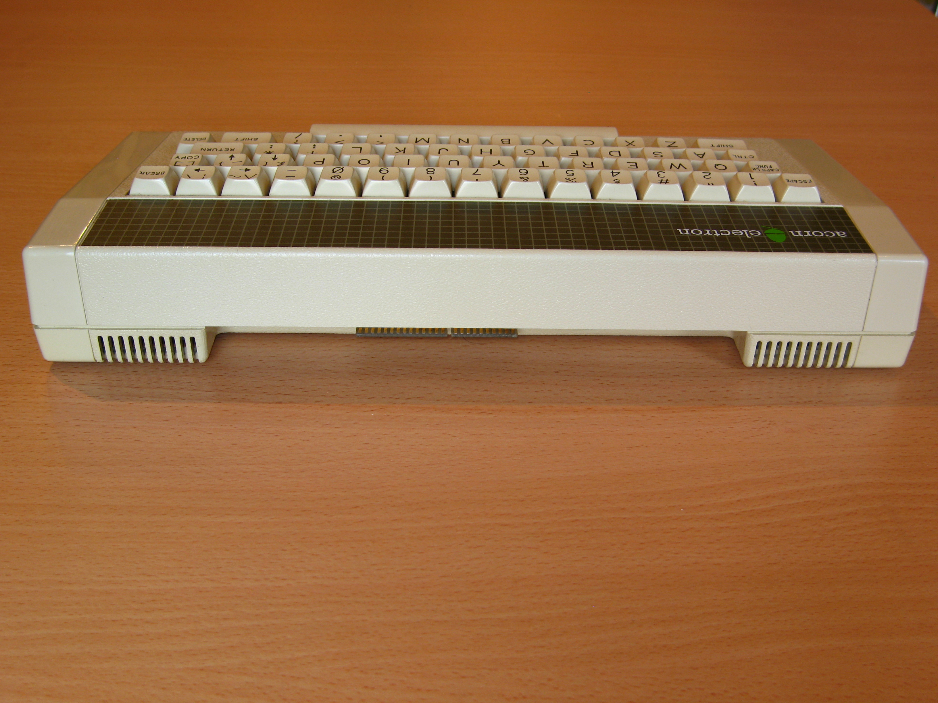 Ordenador doméstico Acorn Electron, vista trasera, en la MadriSX & Retro 2007